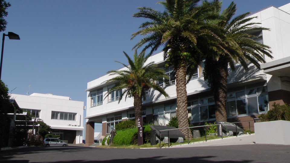 市立銚子高校校舎（管理棟前から春台会館をのぞむ）